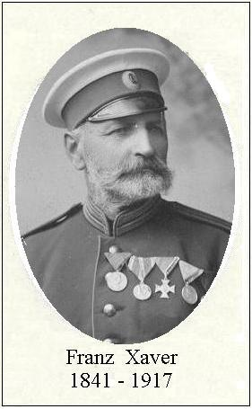 Franz Xaver von Hauschwitz